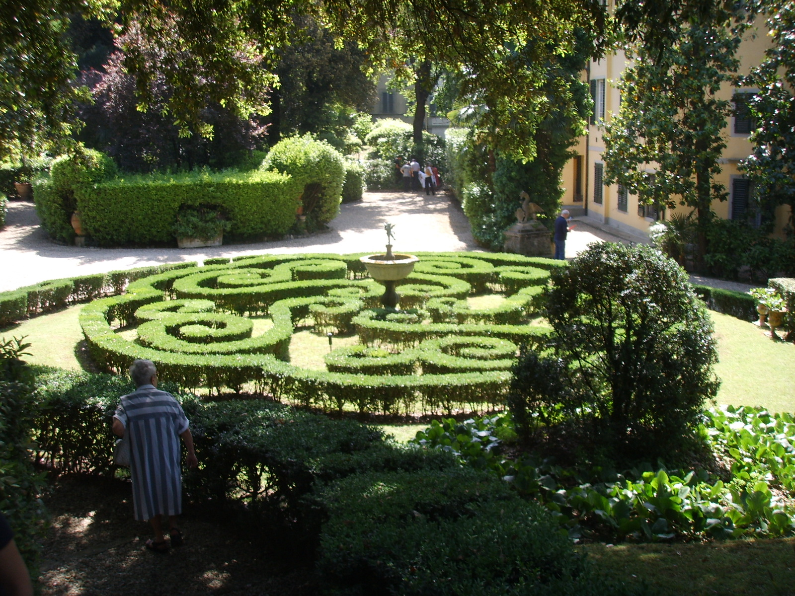 Parterre garden, at Giardino Corsi Annalena in Florence, Italy.